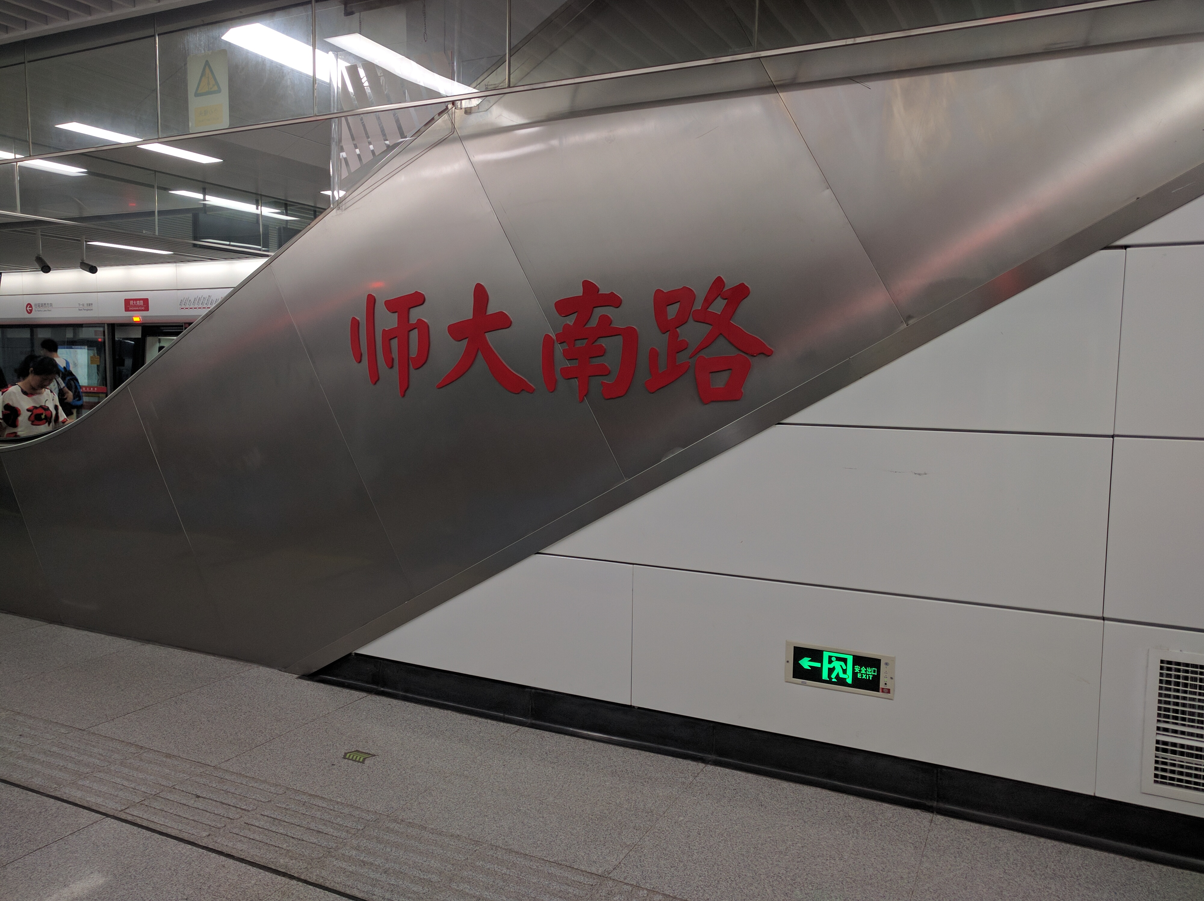 师大南路站站名